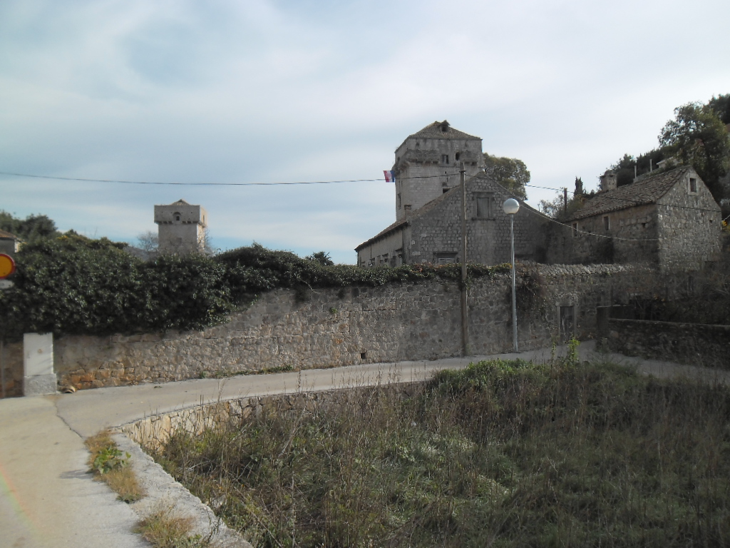 ljetnikovac Skočibuha na Šipanu